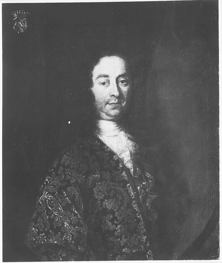 Franz Joseph von Wiser (1679-1755), Reichsgraf, kurpfälzischer Beamter, Ortsherr und Erbauer von Schloss Friedelsheim